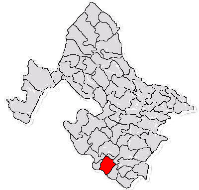 Categorie:Hărţi ale judeţului Mehedinţi